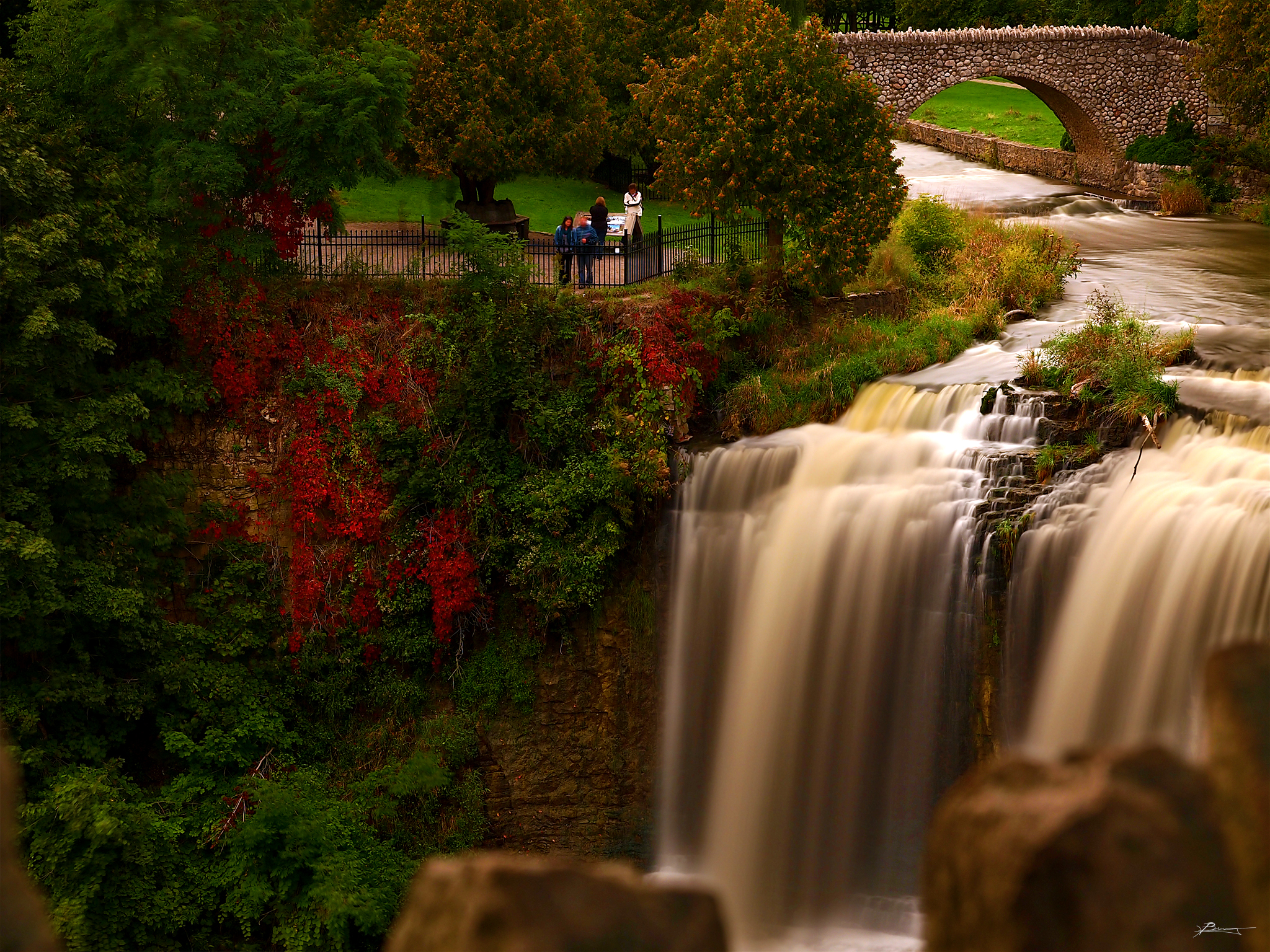 websters